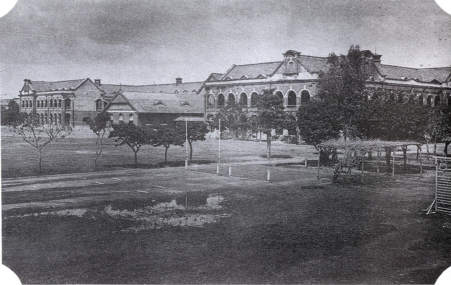 建國中學紅樓南側，南側中央的講堂尚未改建，因此拍攝時間早於1938年。